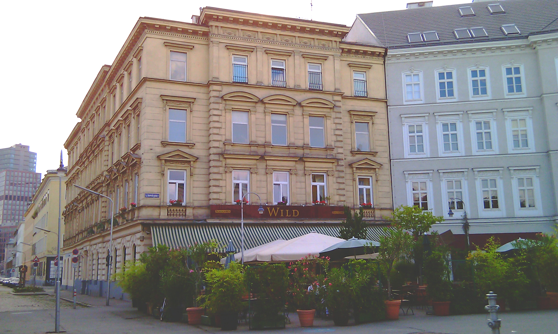 Haus Radetzkyplatz 1 in Wien-Landstraße